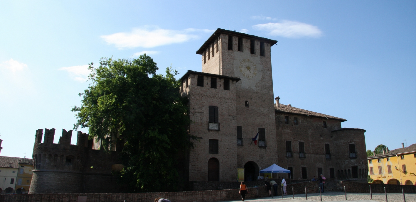 Entrata della La Rocca Sanvitale di Fontanellato. Marzo 2005